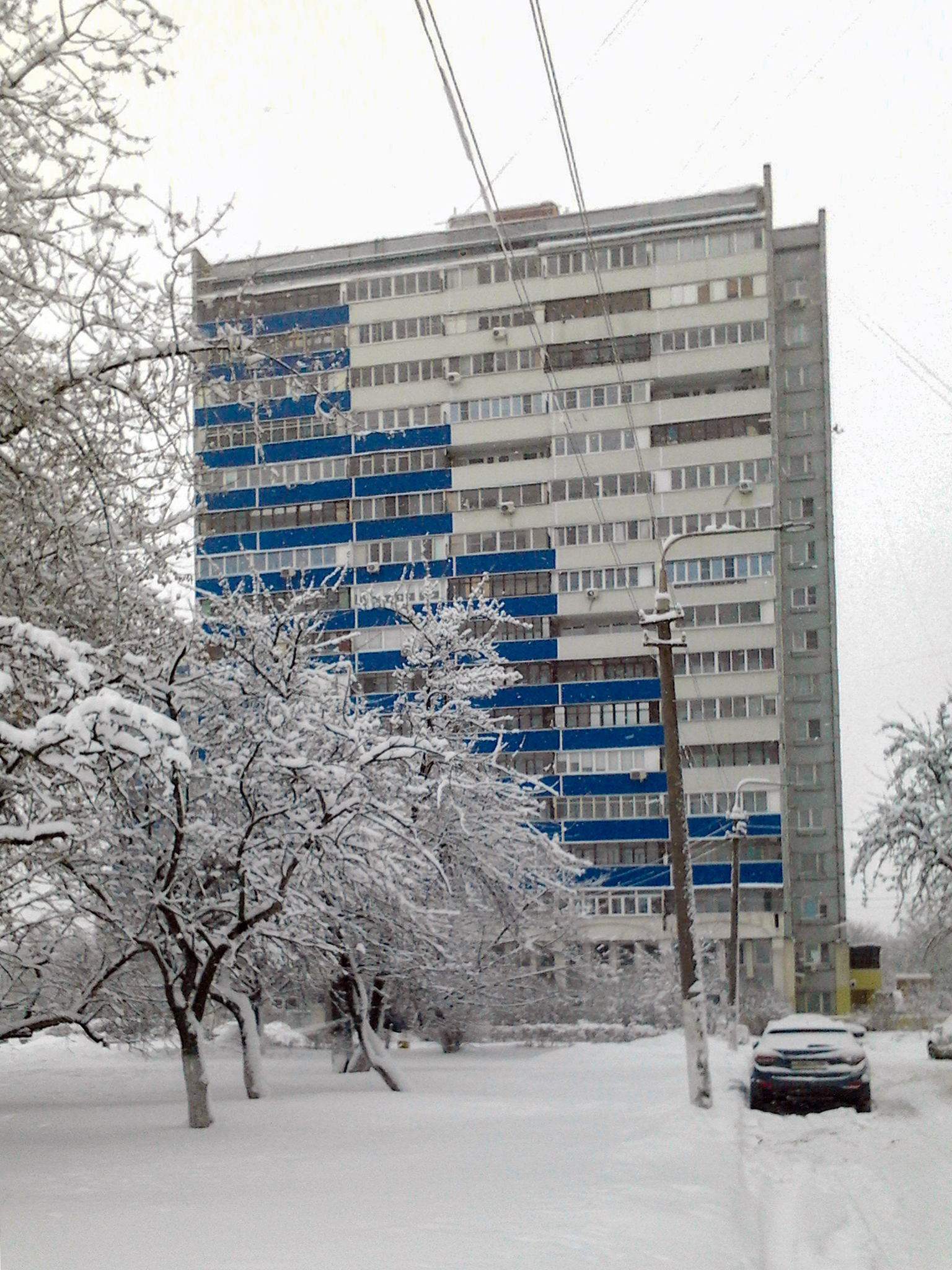 В этом доме жил В. В. Стекольников